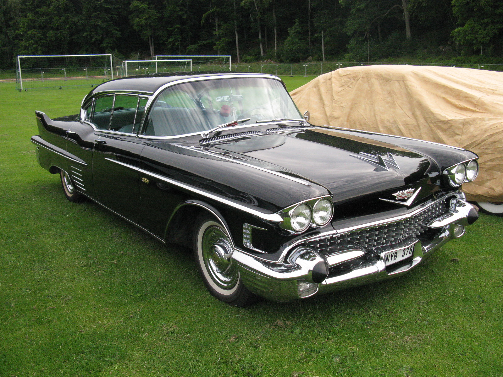 Cadillac Sedan De Ville 1958